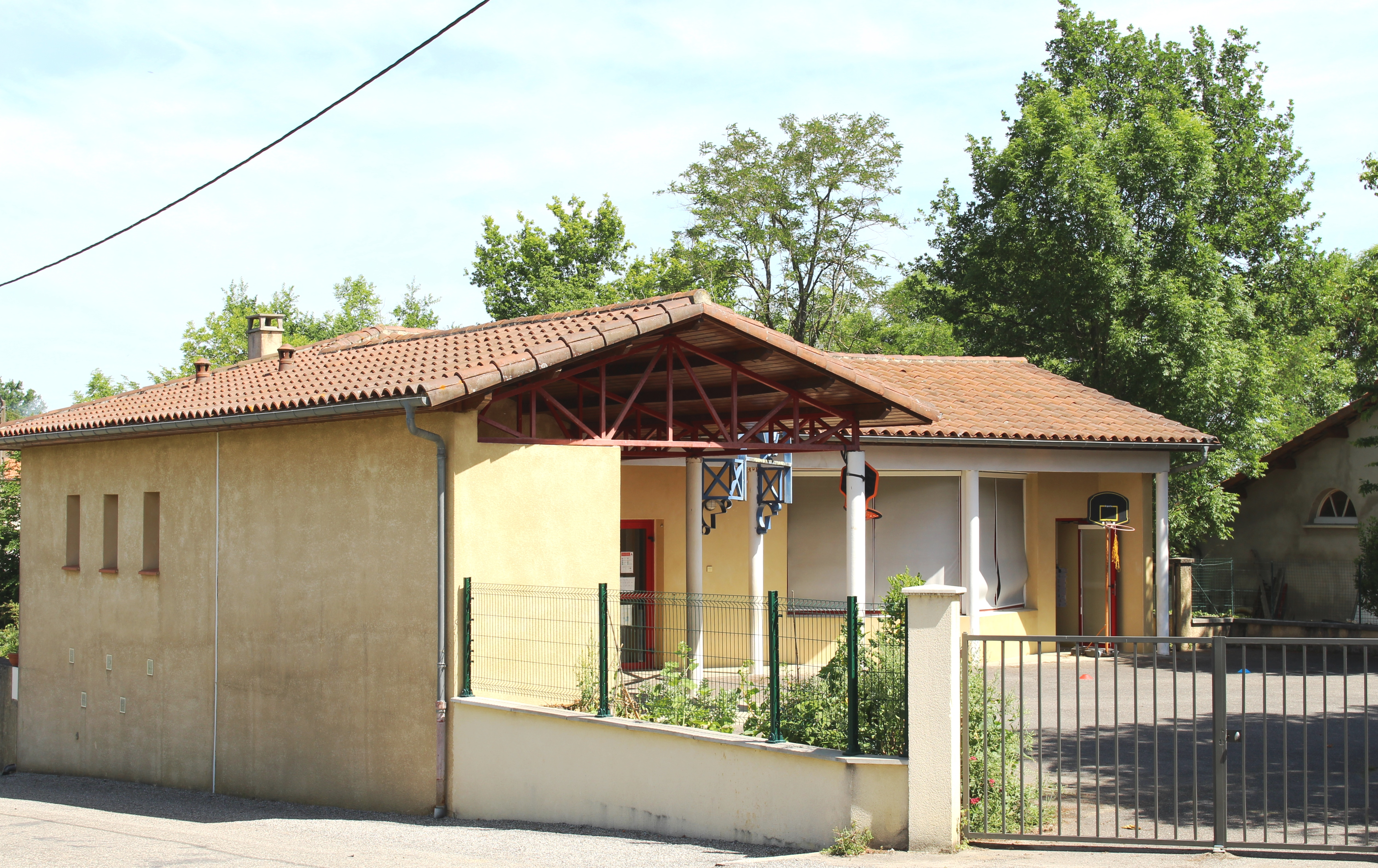 École de Peyrun (Hautes-Pyrénées)